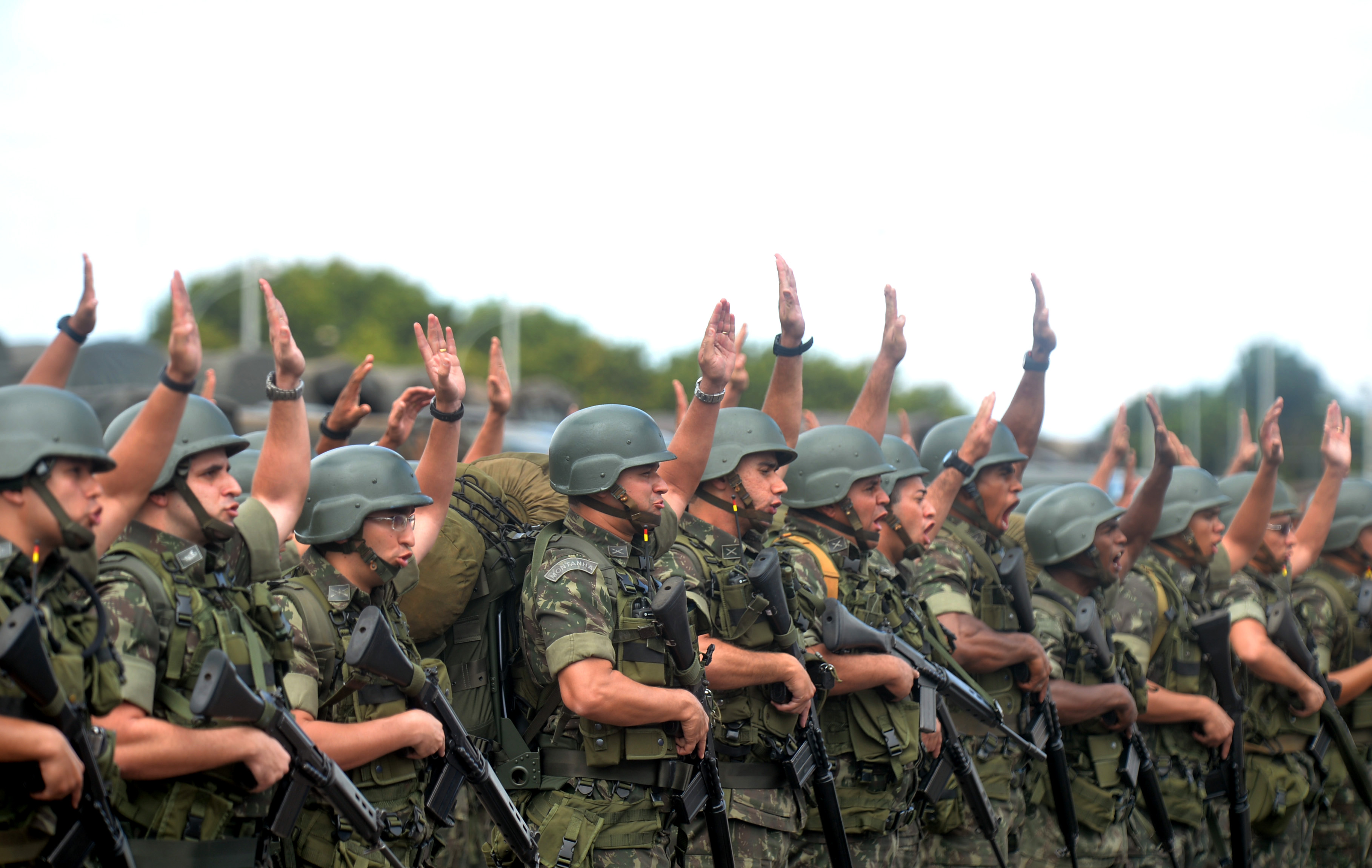 08/06/2014, Brasília - DF Fotos: Tereza Sobreira